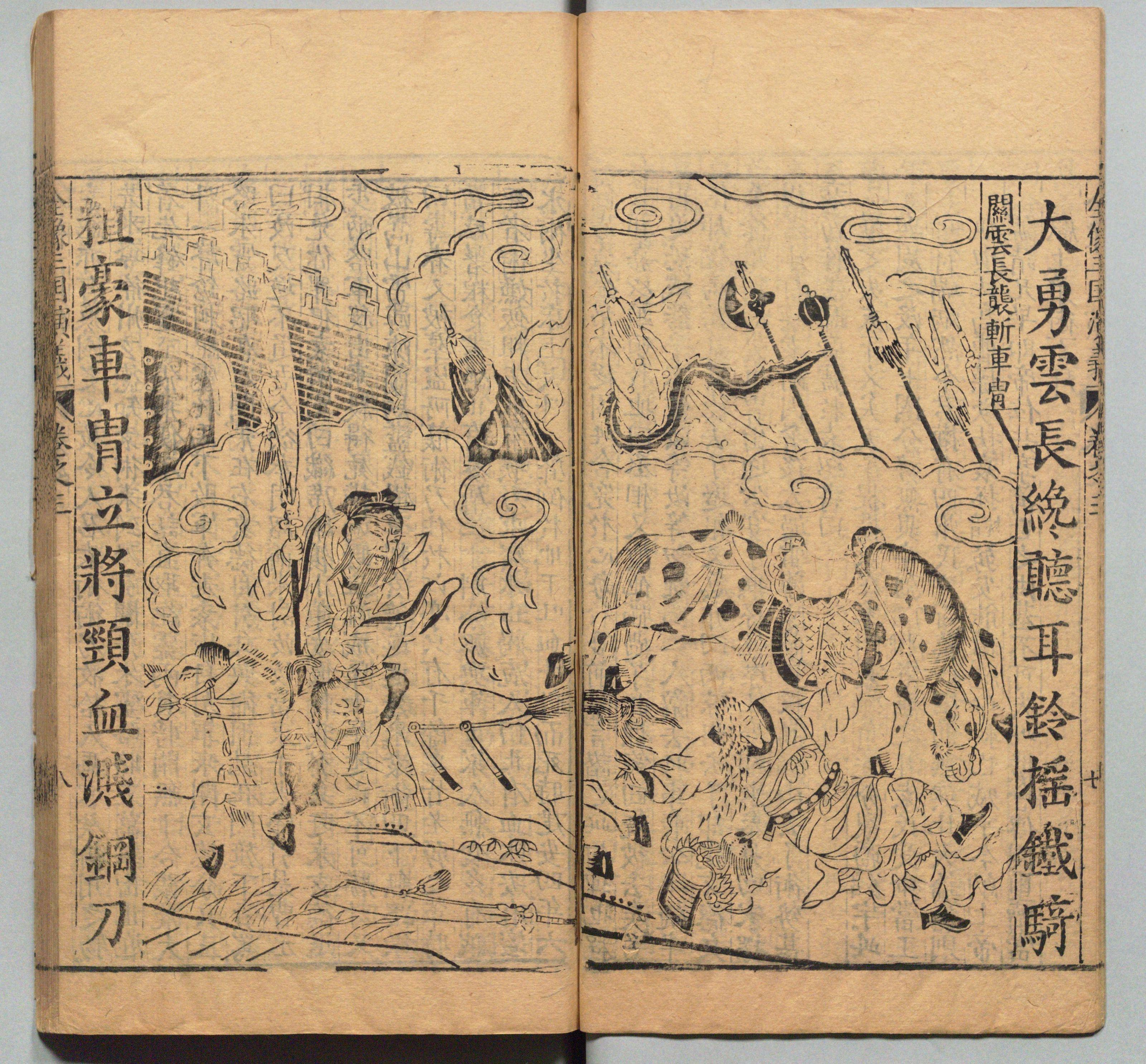 《新刊校正古本大字音释三国志通俗演义》 明万历十九年书林周曰校刊本